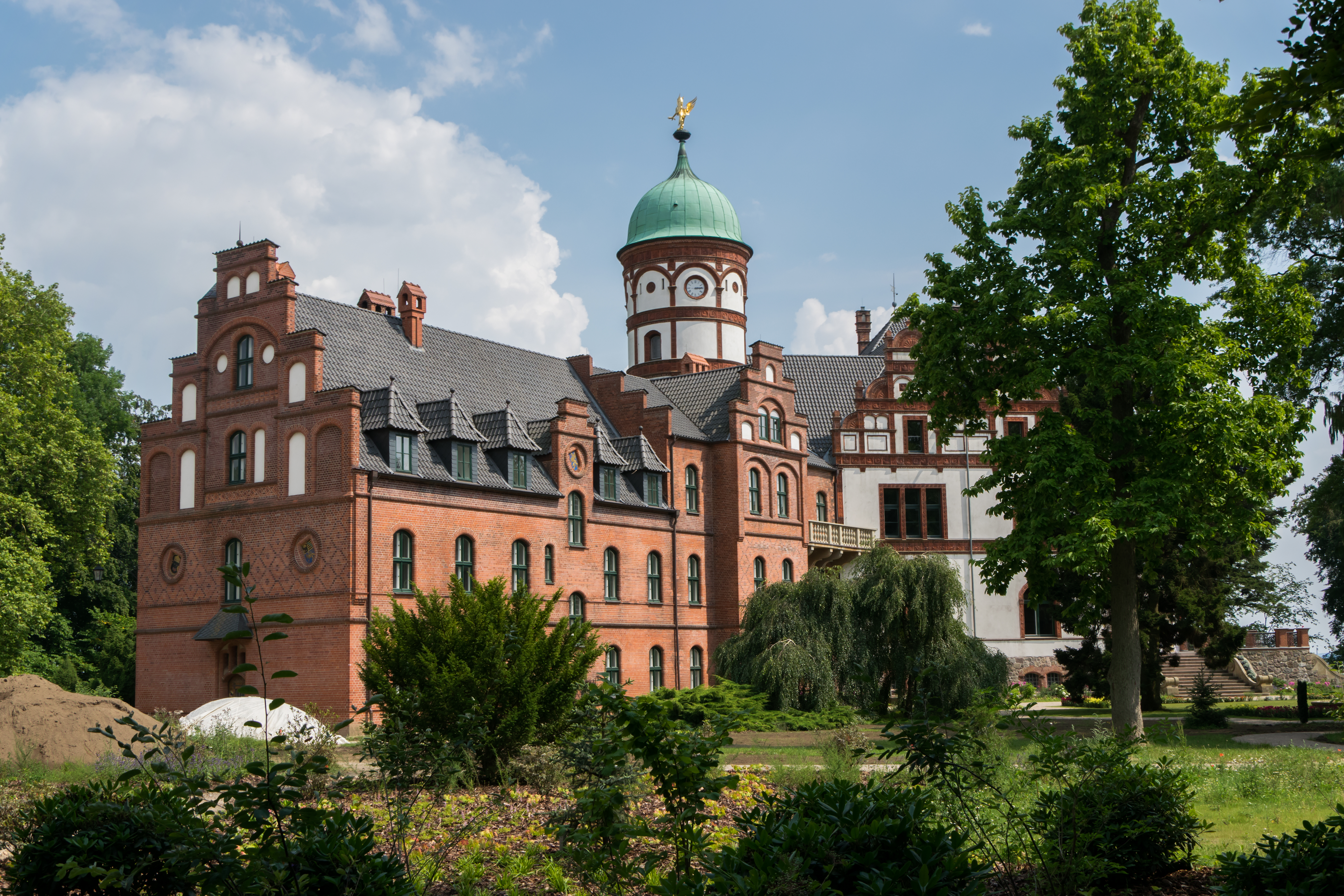 Lübstorf Schloss Wiligrad